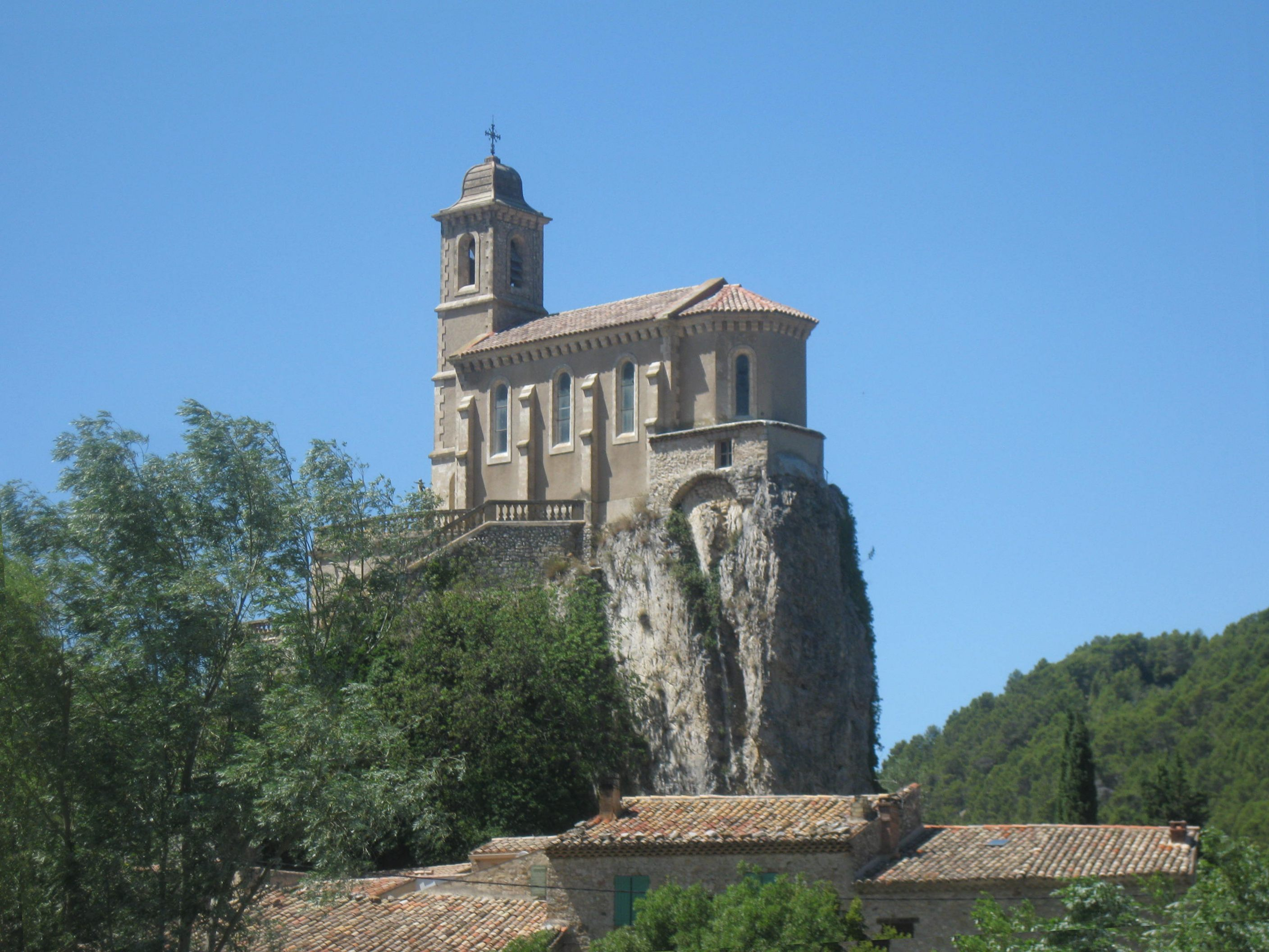 Kapelle Notre-Dame-de-Consolation in Pierrelongue (Drôme, Frankreich).